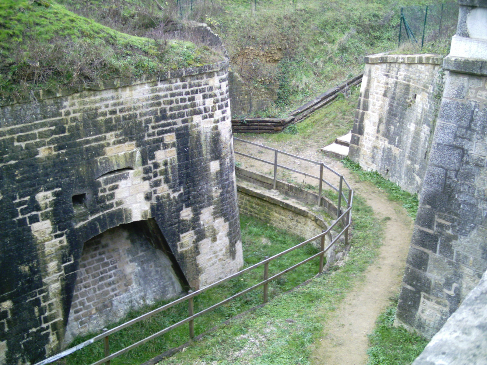 Fortification externe autour du village de Villey-le-Sec, a hauteur du croisement D909 / route d'accès au camping